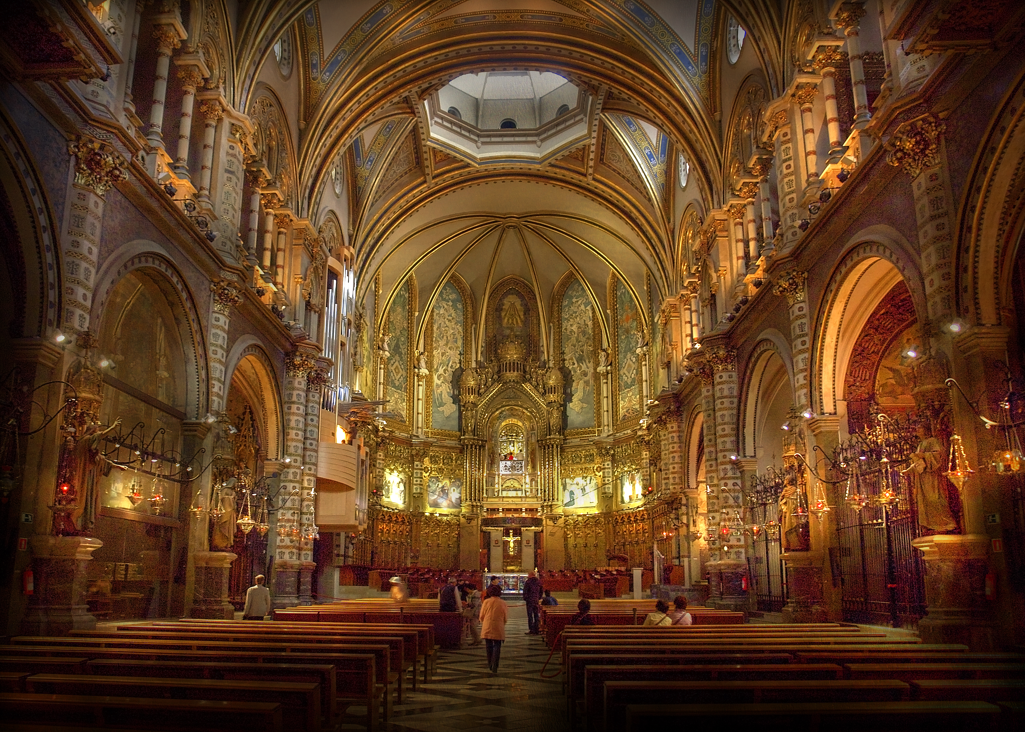 Interior monestir de Montserrat